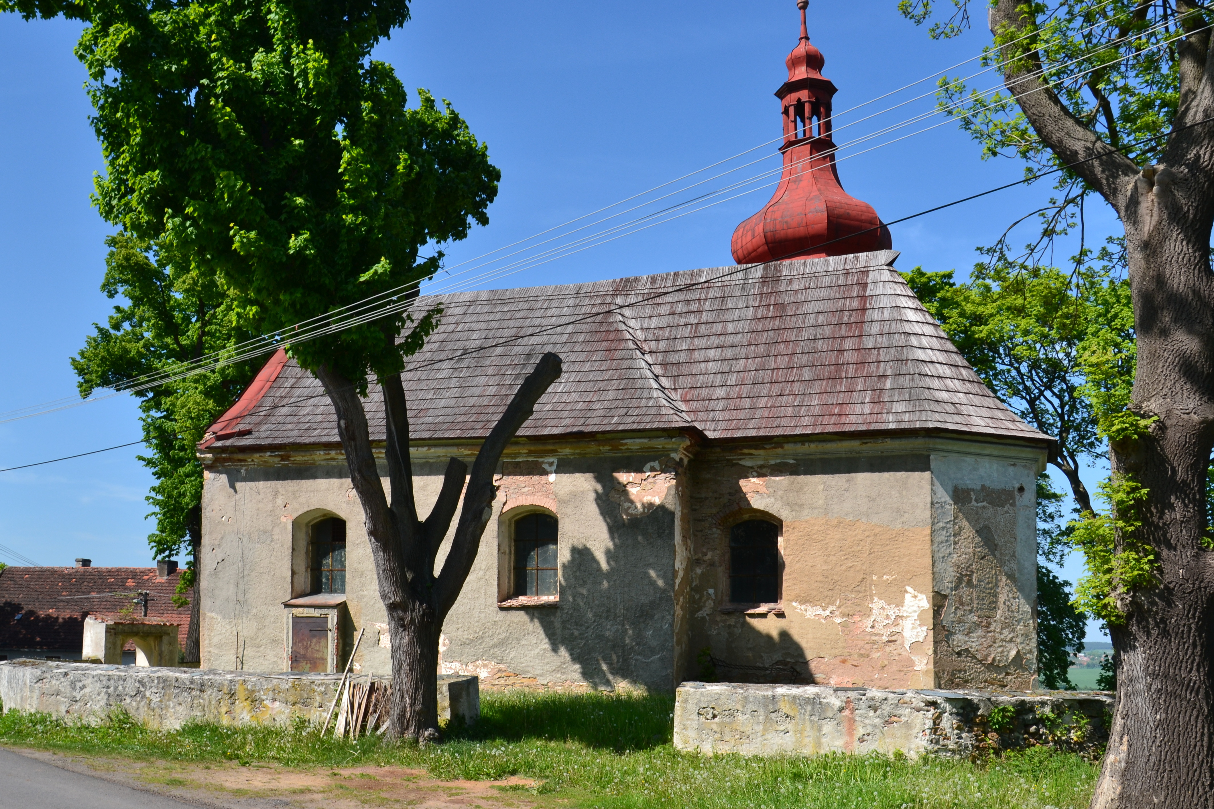 Kostel sv. Jiljí (Chlum), Chlum